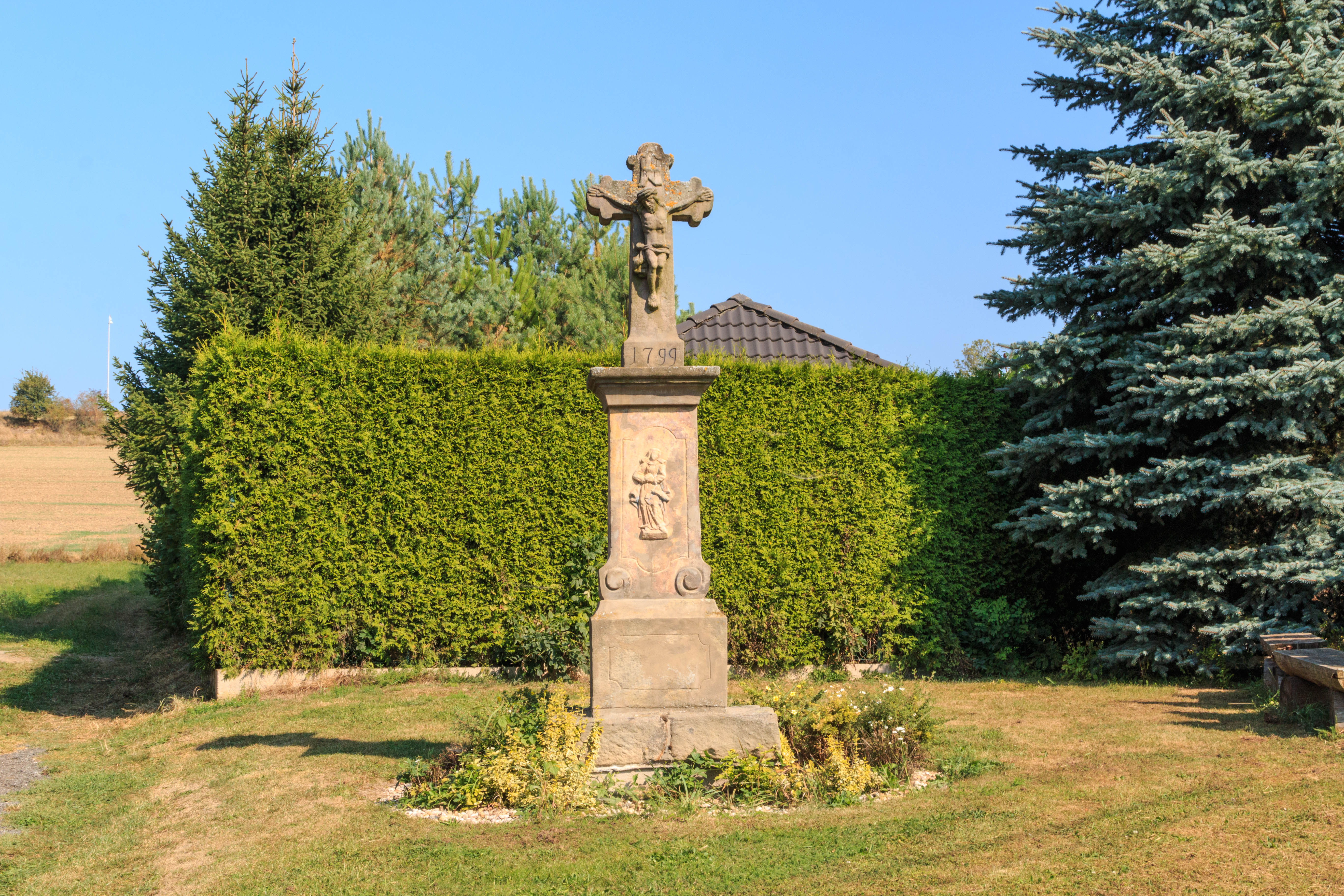 Javornice u Kněžnice - kříž